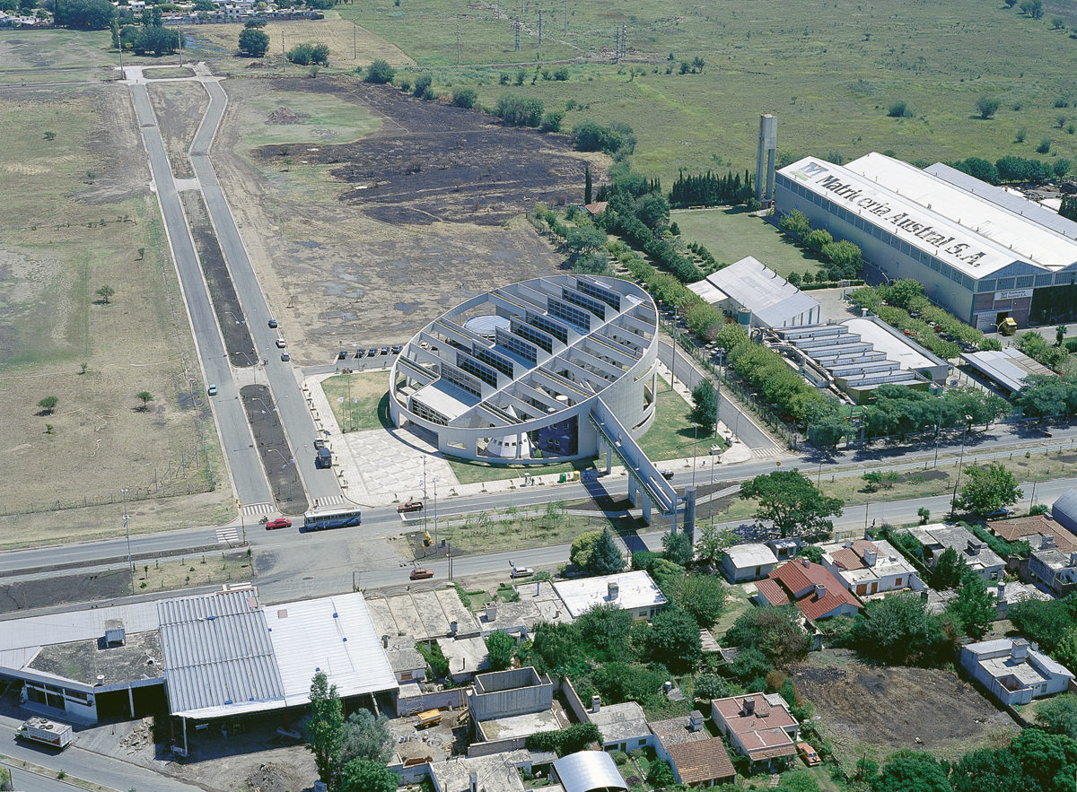 Centro de Participación Comunal Monseñor Pablo Cabrera (Miguel Ángel Roca, 1996-99). Cabrera 4800, Córdoba, Argentina.